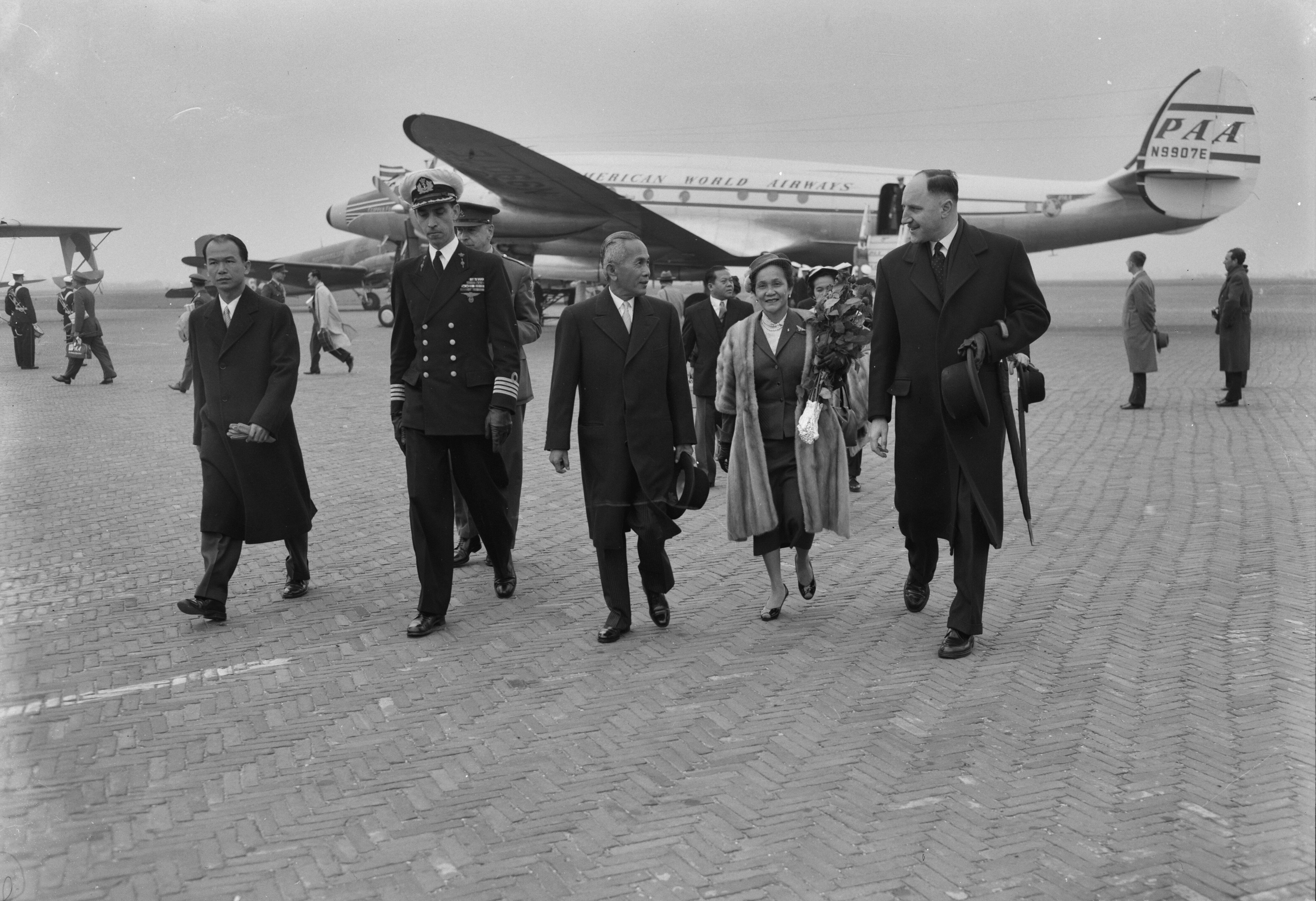 Collectie / Archief : Fotocollectie Anefo Reportage / Serie : [ onbekend ] Beschrijving : Aankomst Premier van Thailand Piboel Soggram Datum : 24 mei 1955 Trefwoorden : AANKOMSTEN, premiers Fotograaf : Noske, J.D. / Anefo Auteursrechthebbende : Nationaal Archief Materiaalsoort : Negatief (zwart/wit) Nummer archiefinventaris : bekijk toegang 2.24.01.04 Bestanddeelnummer : 907-1540